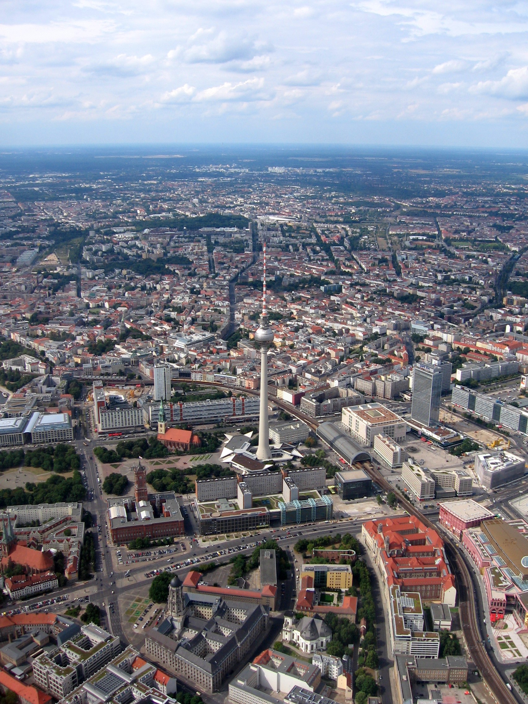 Fernsehturm Berlin aus der Luft